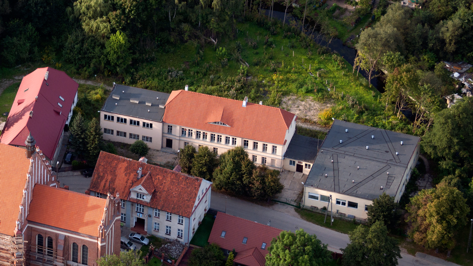 pozostałości dawnego zamku biskupiego Barczewo, ul. Nowowiejskiego 9, Barczewo (miasto)